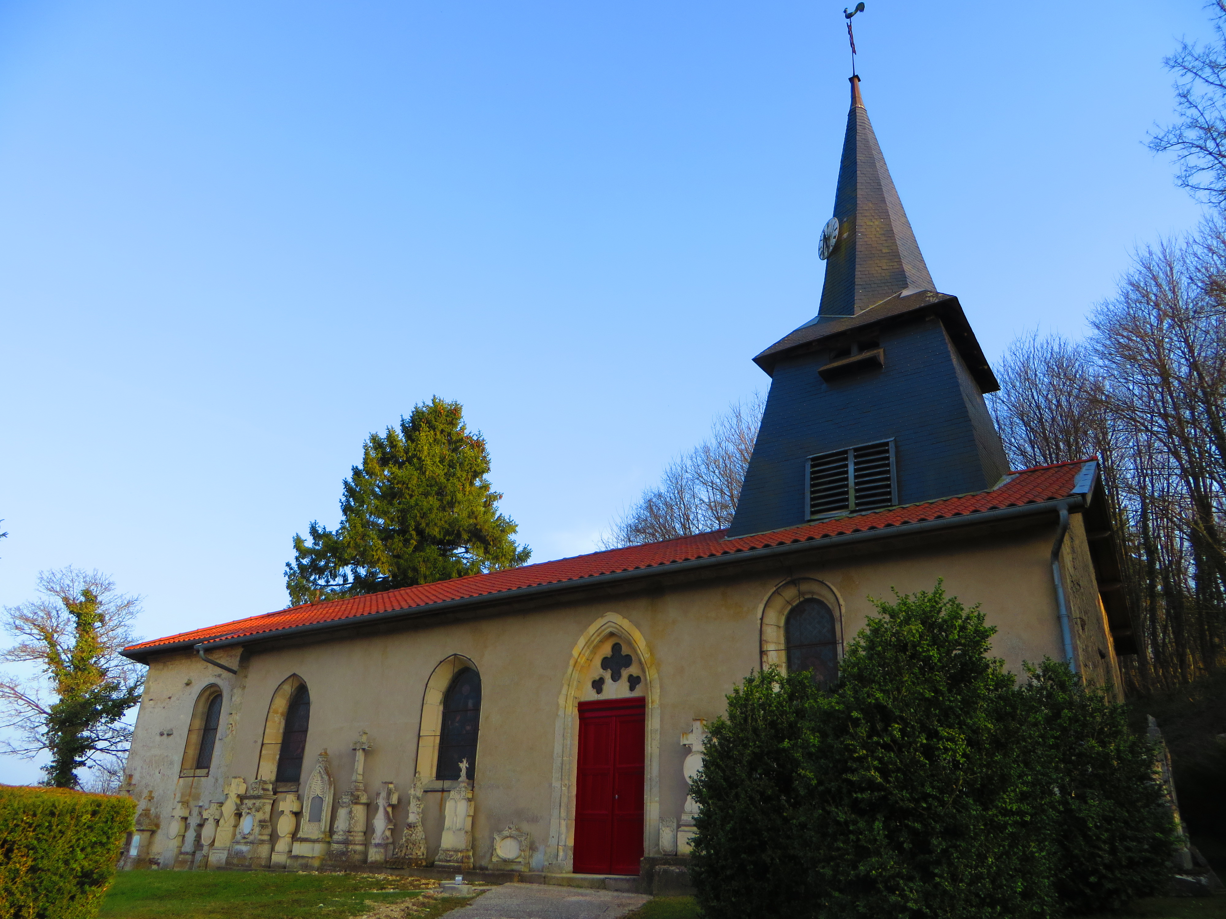 Raival Église Saint-Martin de Erize la Grande